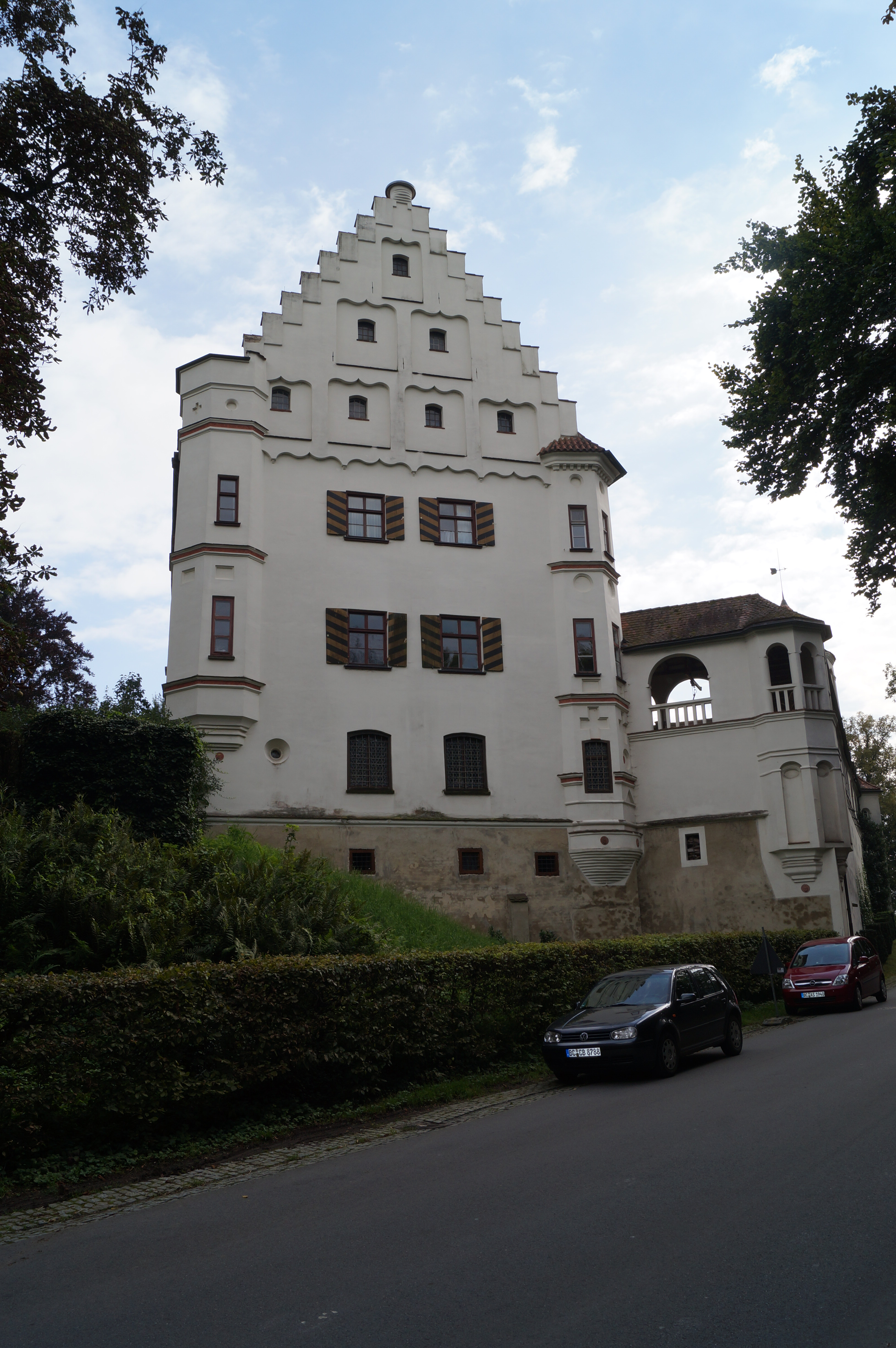 Außenansicht Schloß Mittelbiberach